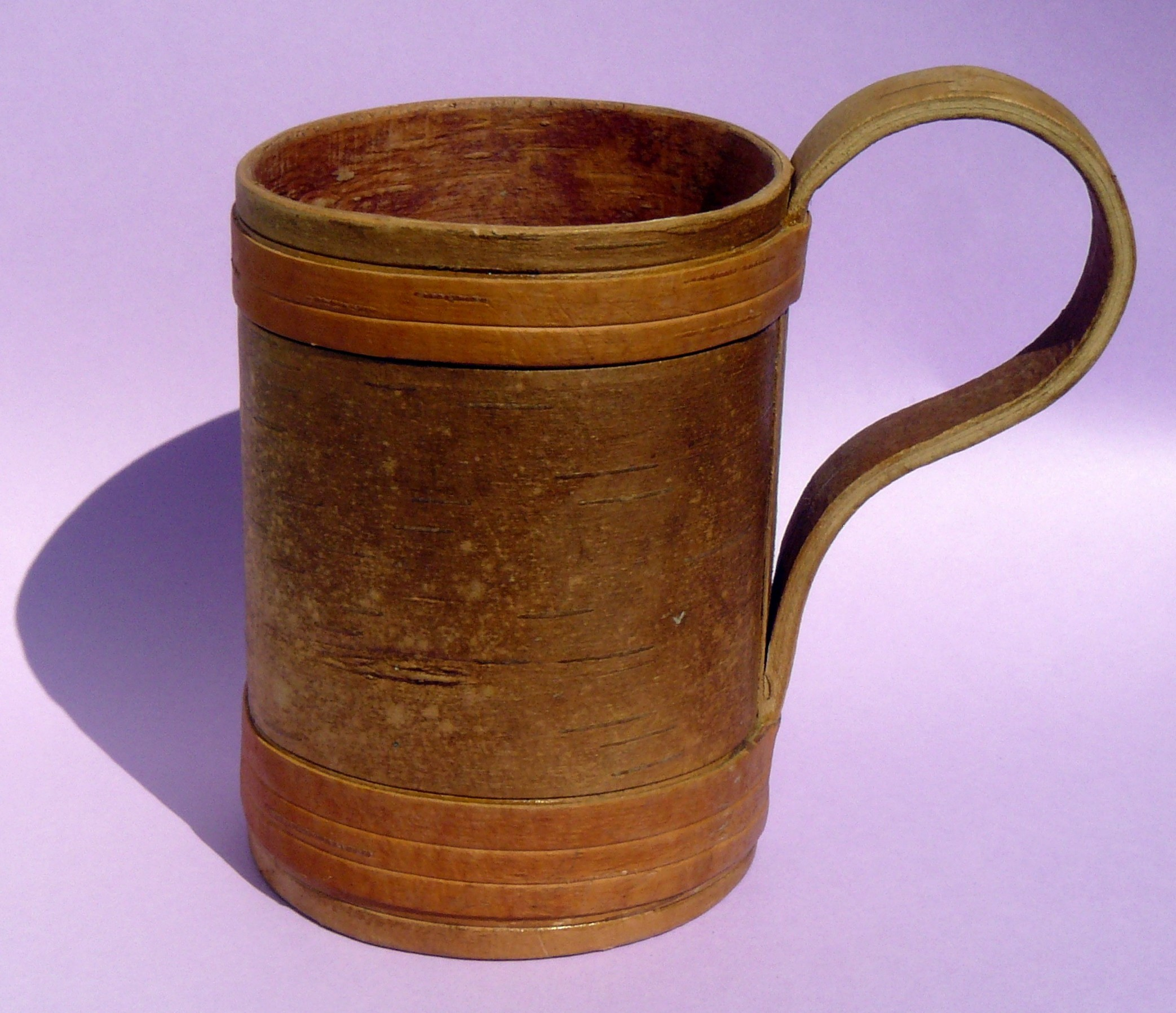 Une chope en bouleau (travail artisanal)